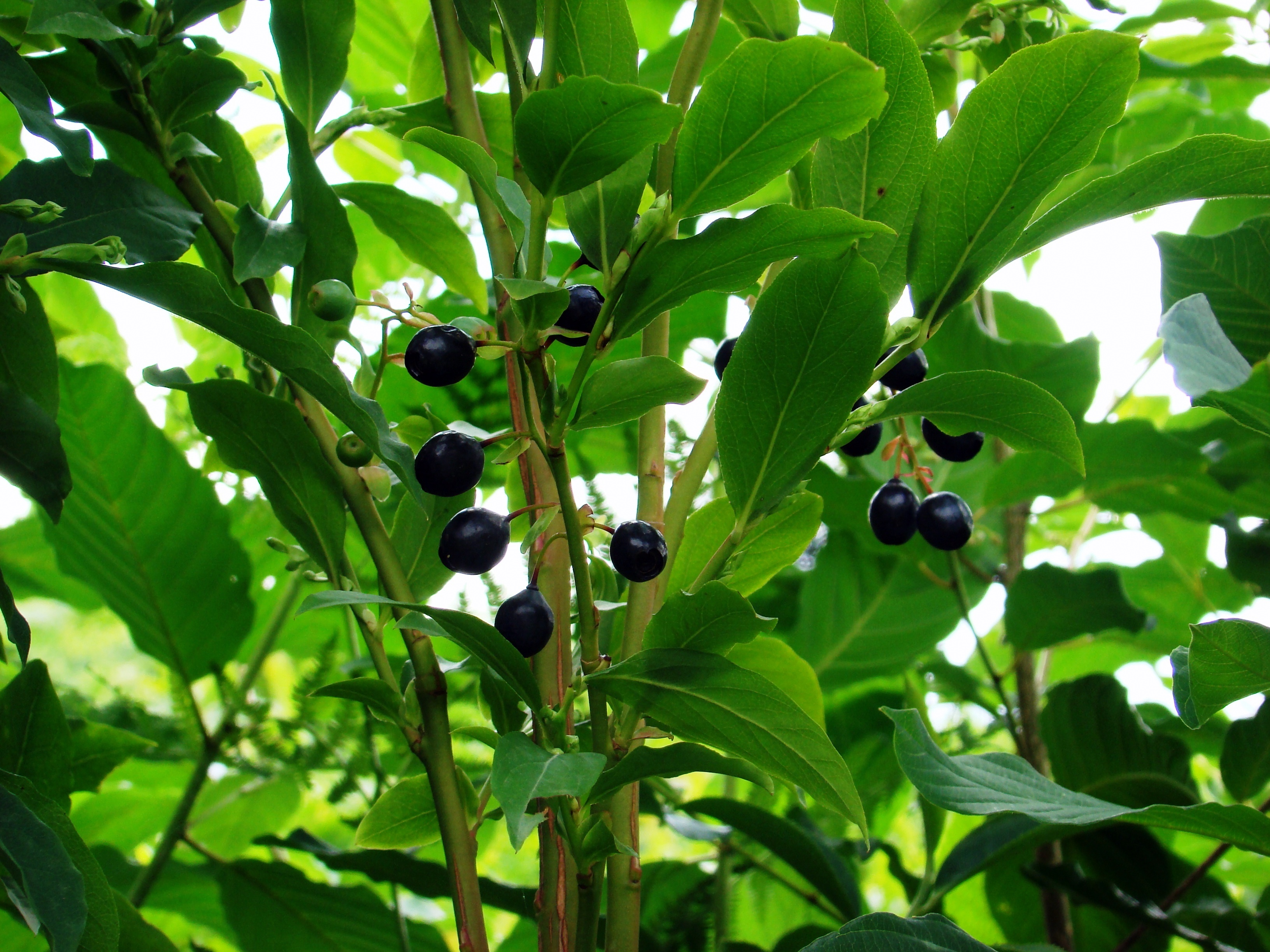 Vaccinium arctostaphylos